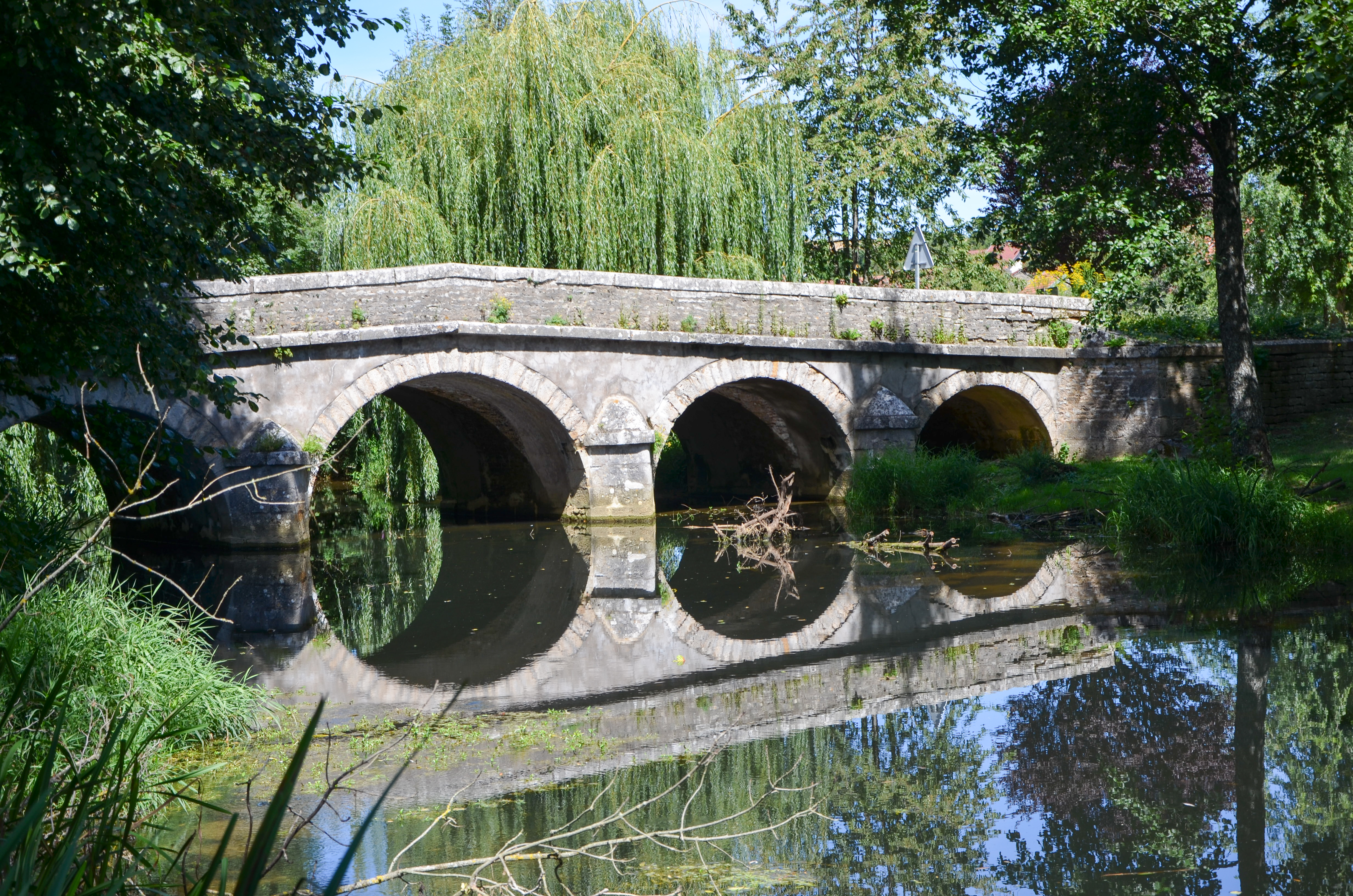 Pont du 18ème siècle a Dommarien, Haute-Marne, Champagnes-Ardennes, France .